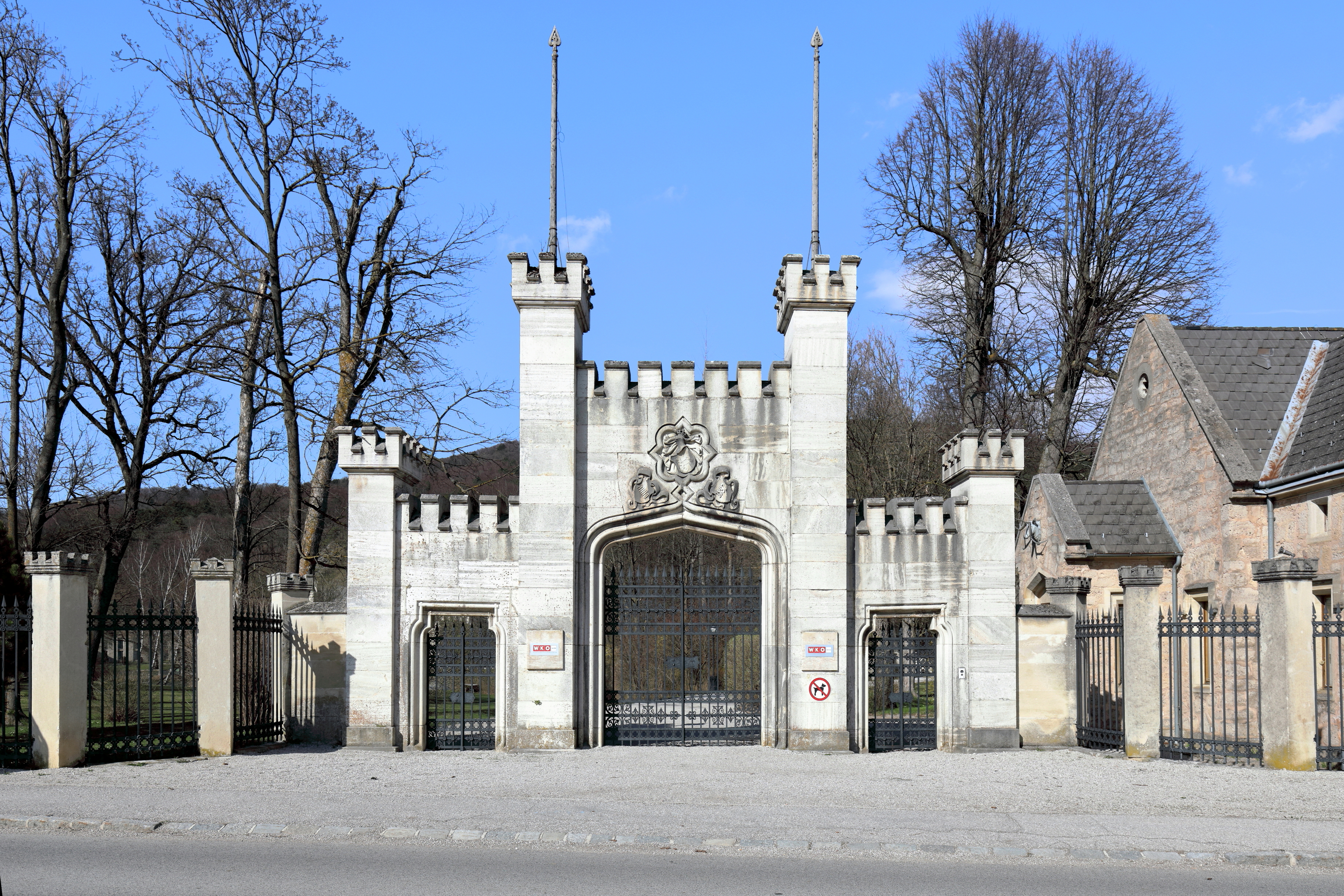 Das Parkportal des Schlosses Hernstein in der niederösterreichischen Marktgemeinde Hernstein.Eine gestaffelte zinnenbekrönte Portalgruppe mit großem Kielbogentor zwischen Pfeilern, flankiert von kleinen Schulterbogentoren. Realisiert 1857 nach einem Entwurf von Theophil von Hansen. Rechts davon das Portierhäuschen mit einem L-förmigen Grundriss und aus Bruchstein-Mauerwerk unter Satteldach (bez. 1857).